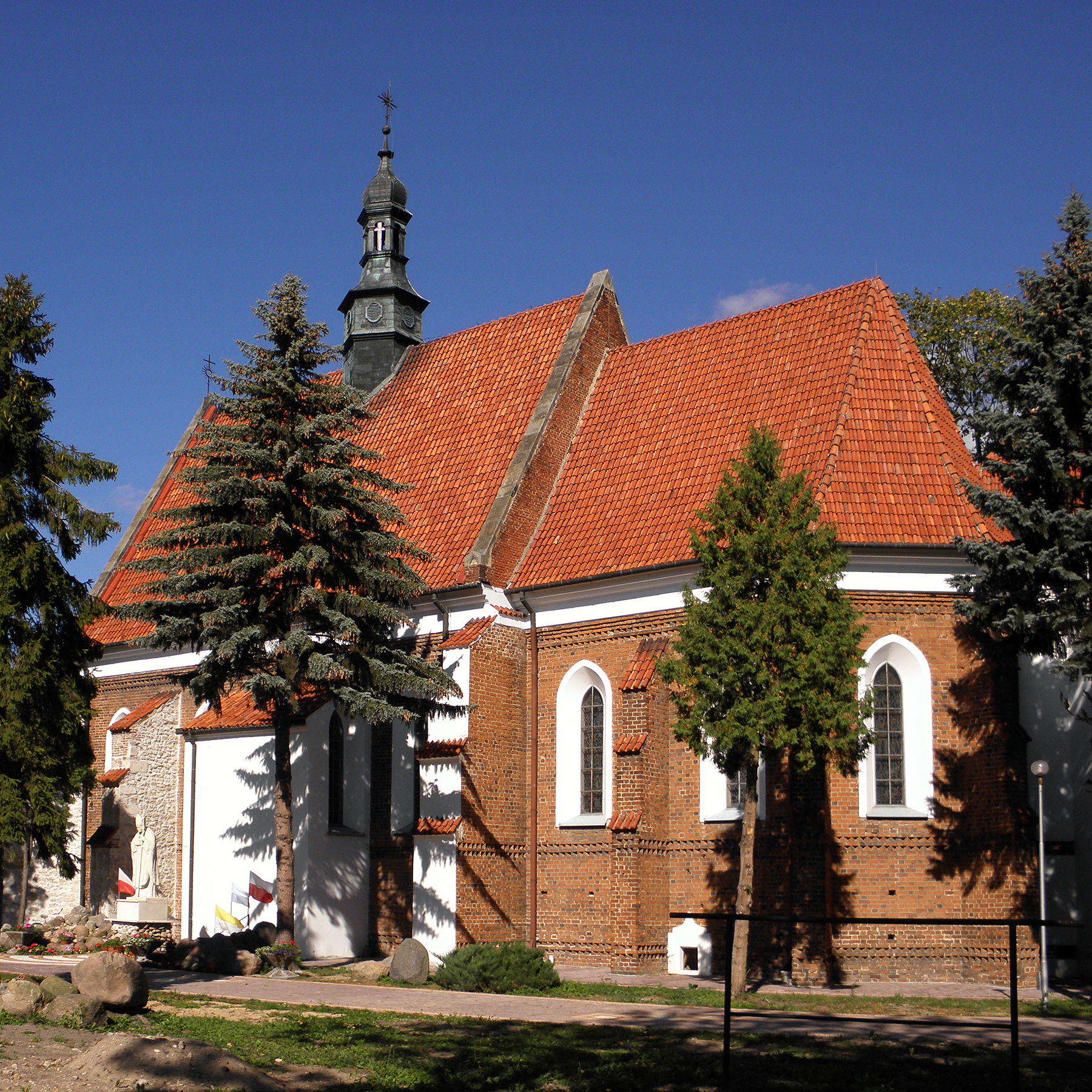 Sienno, kościół parafialny p.w. św. Zygmunta (zabytek nr 147/A z 15.03.1982 i 323/A z 16.06.1967)